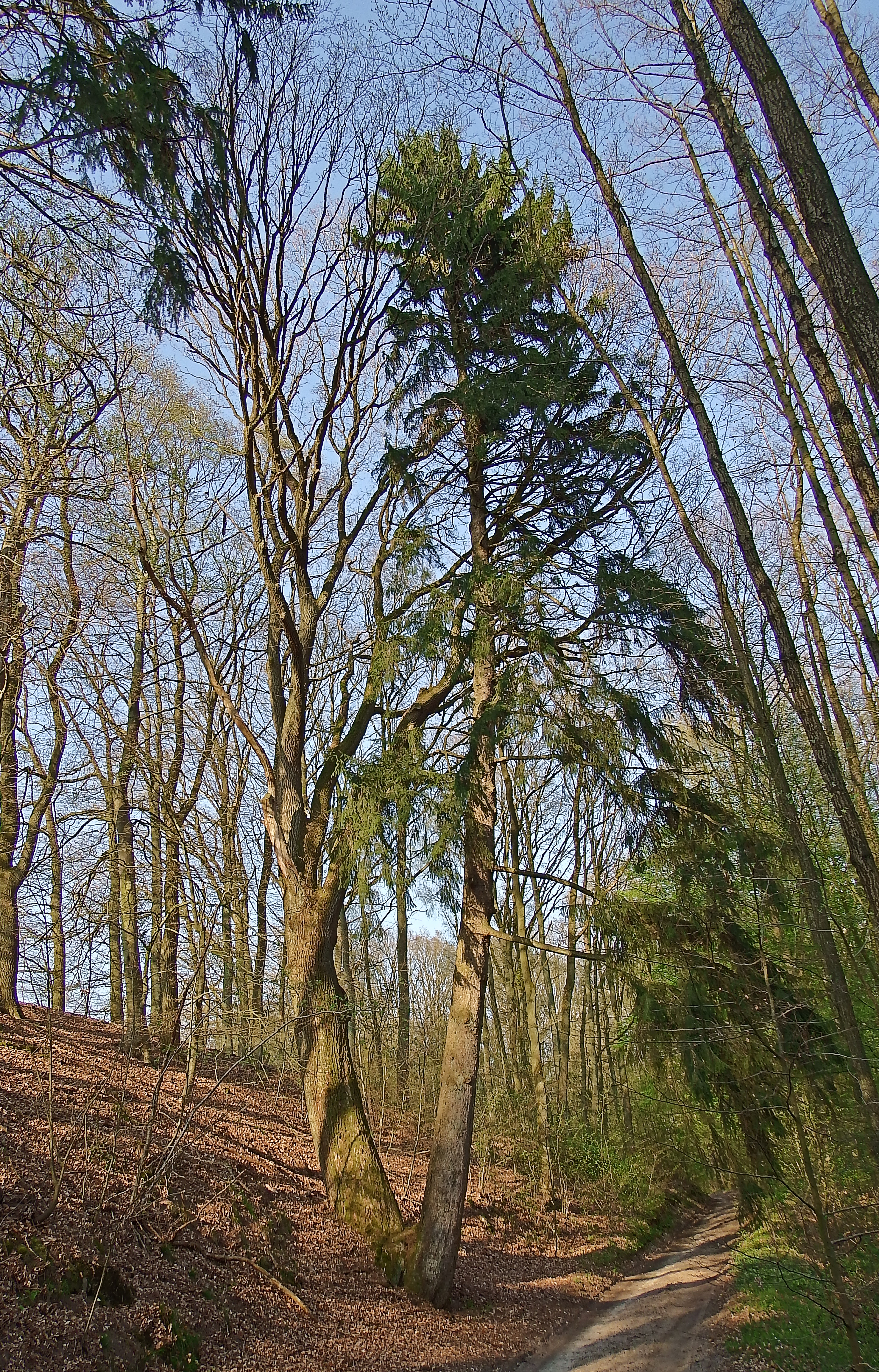 Naturdenkmal "ND WL 00005" im Landkreis Harburg (Niedersachsen): Stieleiche und Rottanne, die zusammengewachsen sind, genannt Ehepaar, südlich von Nindorf am Walde (Gemeinde Hanstedt) und westlich der L 213 am Wegesrand